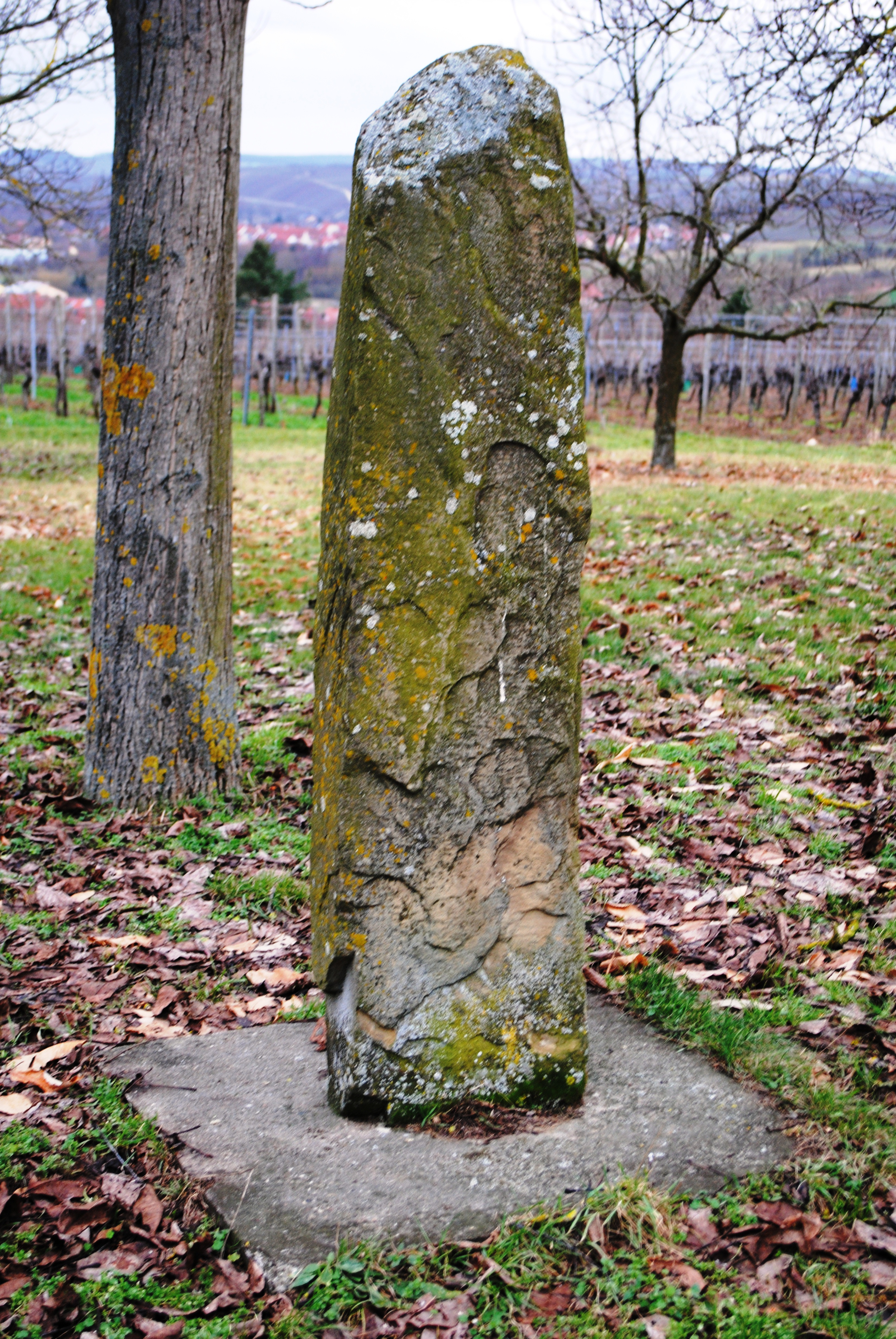 Volkach, Am Waldrand, Bodendenkmal, vorgeschichtlicher Grabhügel, daraus Funde der frühen Latènezeit; D-6-6127-0132